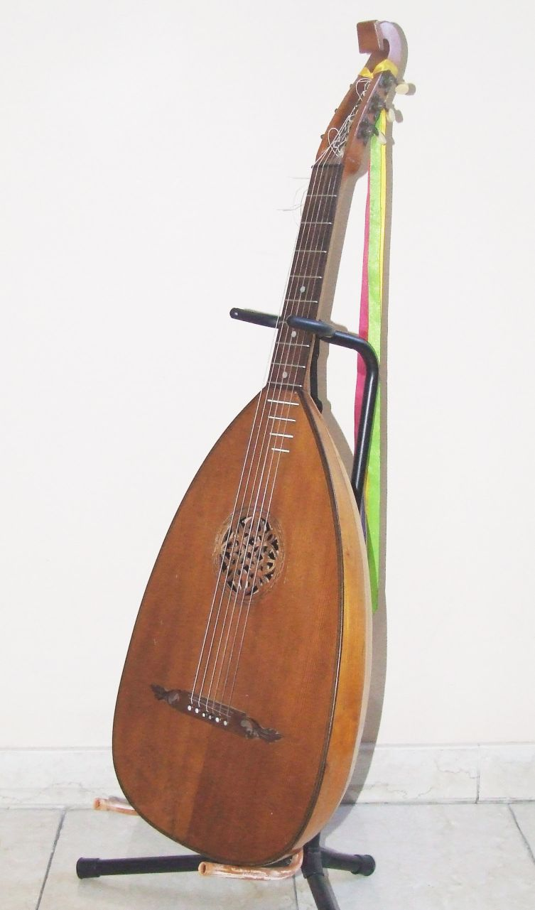 A German lute guitar (Gitarrenlaute) Photographer: User:Neitram, 2007